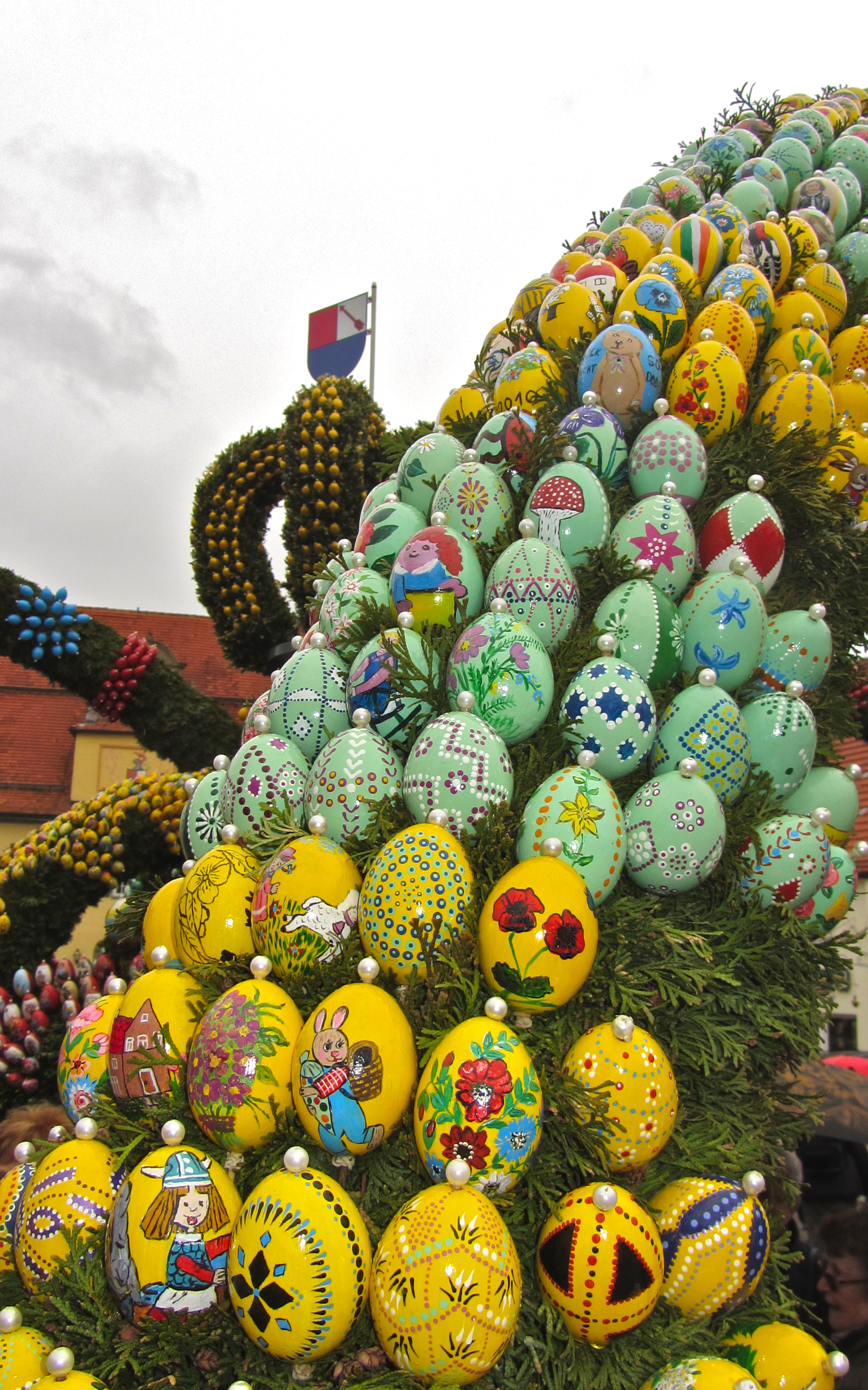 Ausschnitt des Schechinger Osterbrunnens, 2012